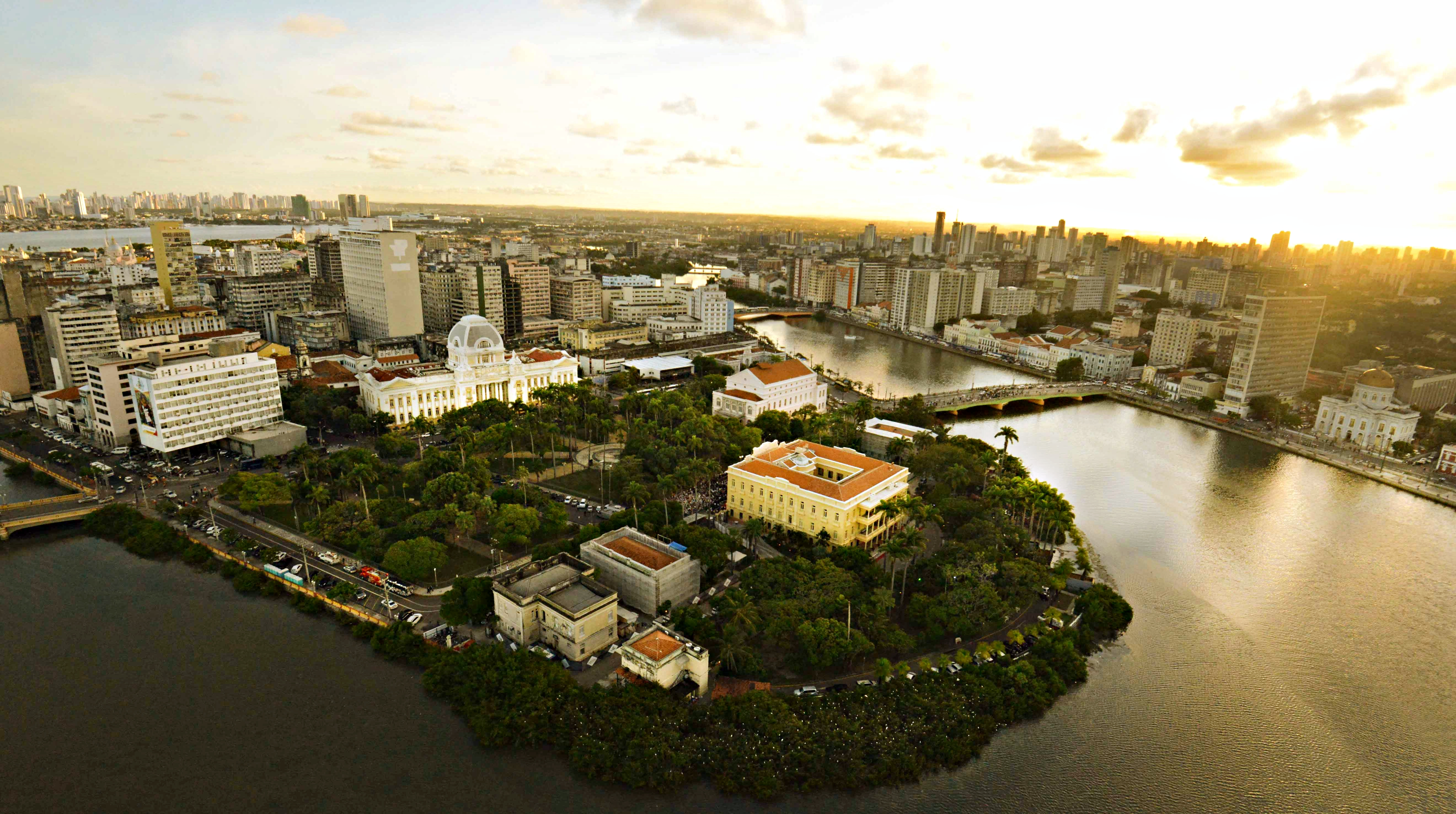 04.04.14 Transmissão do cargo de Governador do Estado para João Lyra Neto - Palácio do Campo das Princesas. Foto: Raul Buarque/SEI